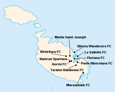 Répartition des clubs de Premier League Maltaise 2008-2009.